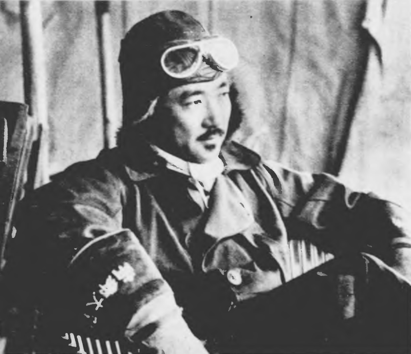 南郷茂章海軍大尉（戦死後少佐）